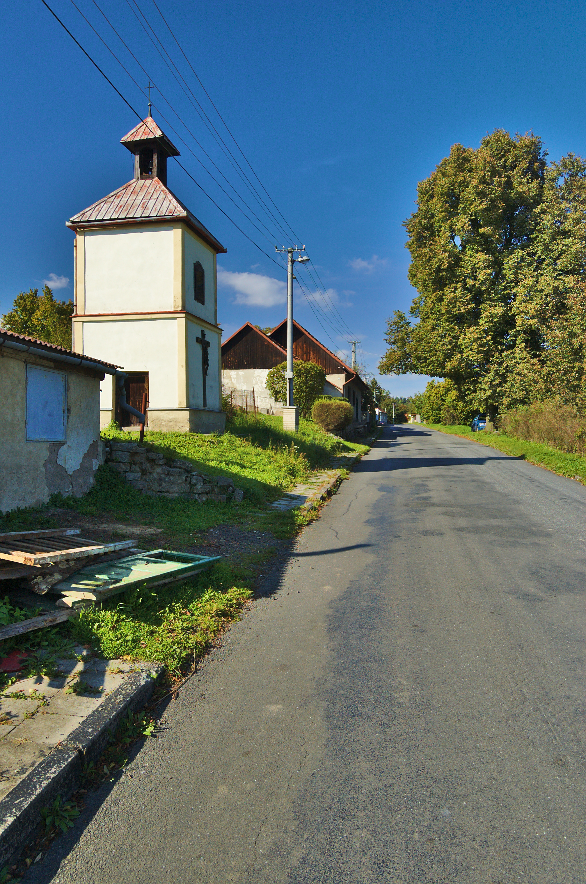 Zvonice, Ladín, Konice, okres Prostějov